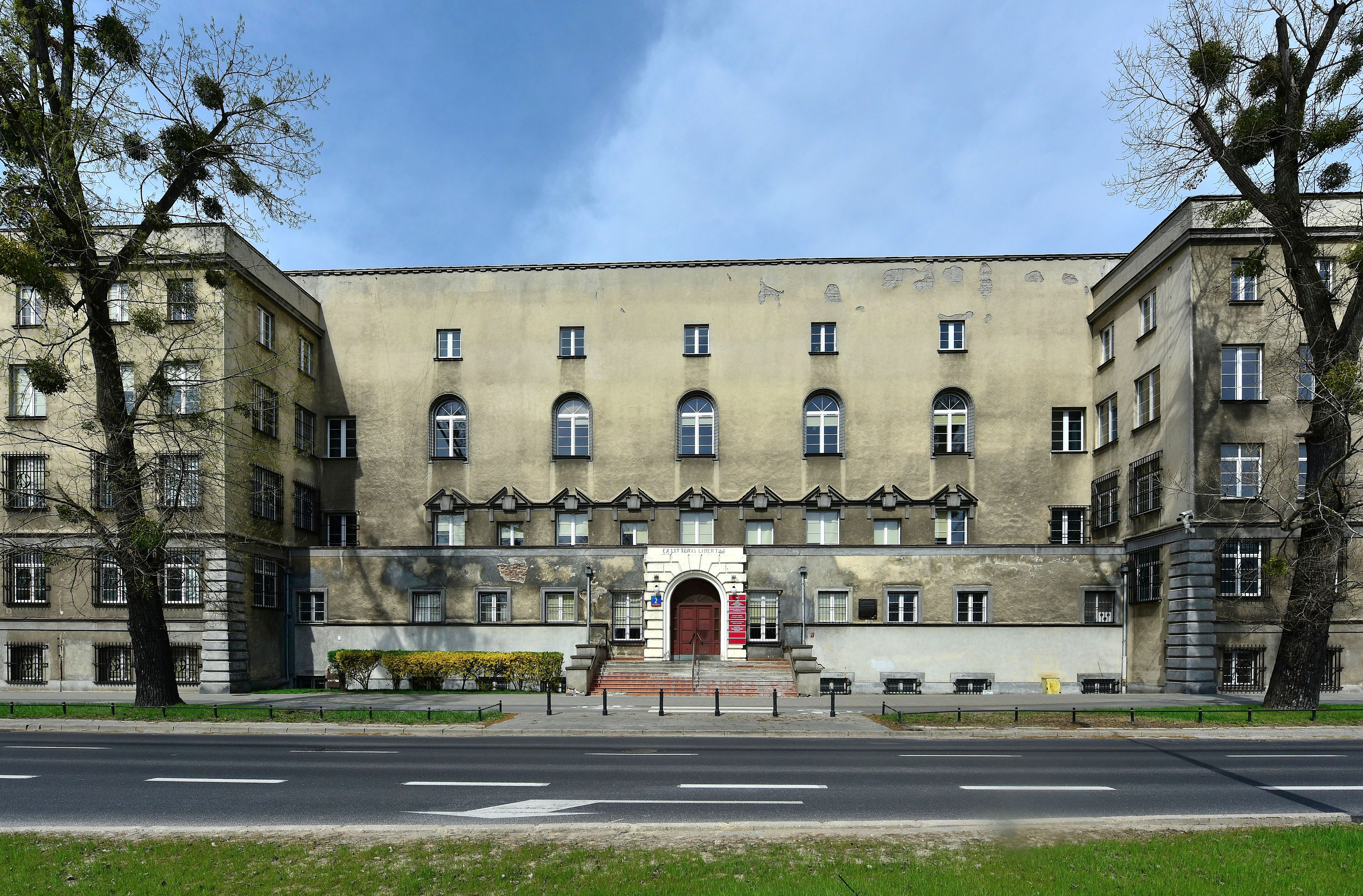 Budynek Wolnej Wszechnicy Polskiej ul. Banacha w Warszawie